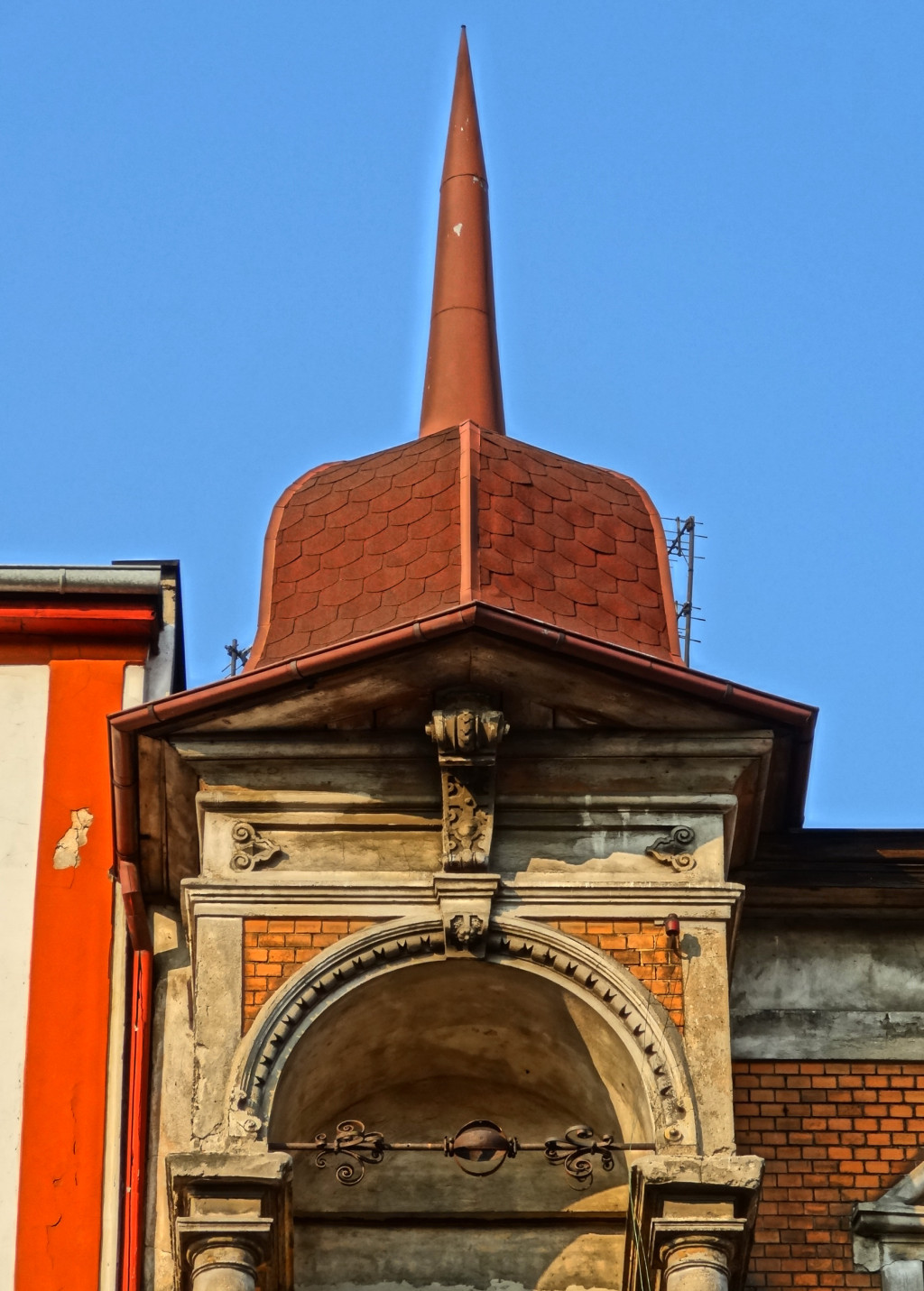 Kamienica przy ul. Dworcowej 98 w Bydgoszczy